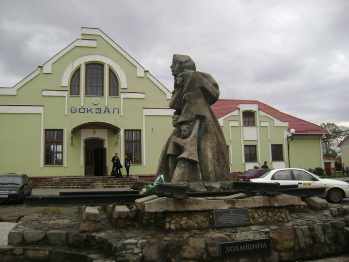 Пам’ятний знак депортованим українцям з Лемківщини, Холмщини, Надсяння, Підляшшя.